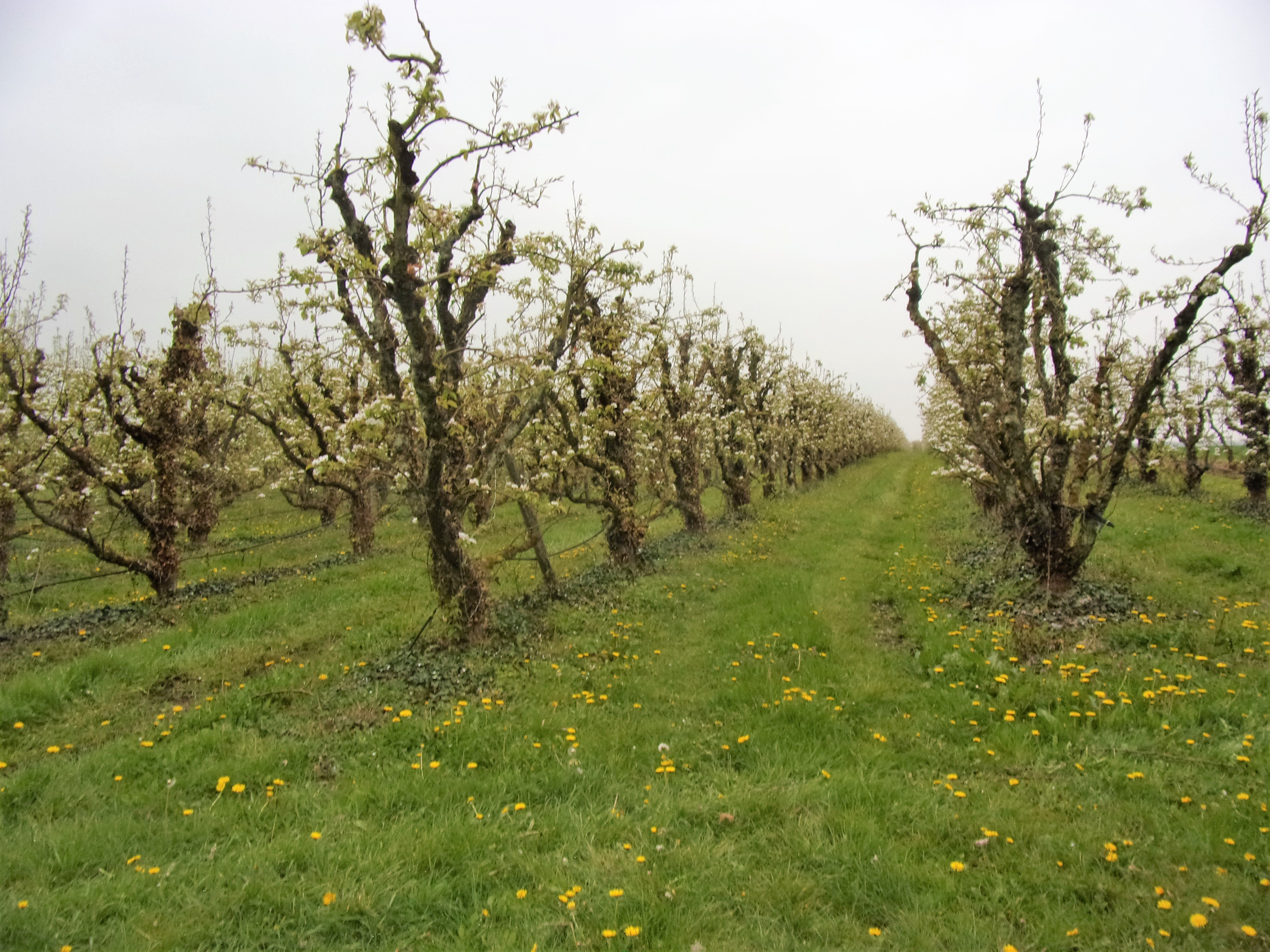 Verger de poiriers (cv. Doyenné du Comice) en fleurs à Veigné (Indre-et-Loire